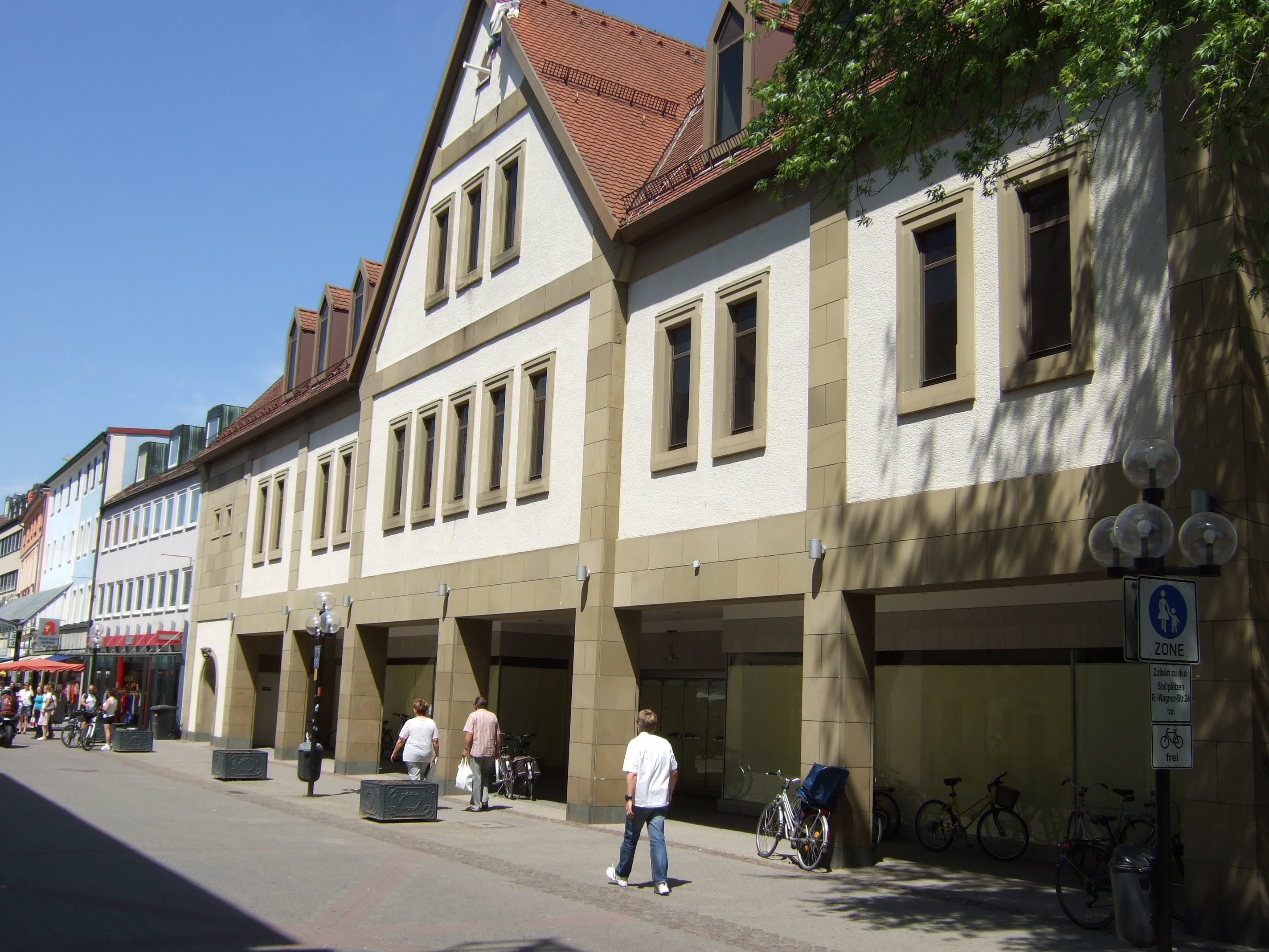 Nachfolgebau Türkenhaus Bayreuth, Richard-Wagner-Straße